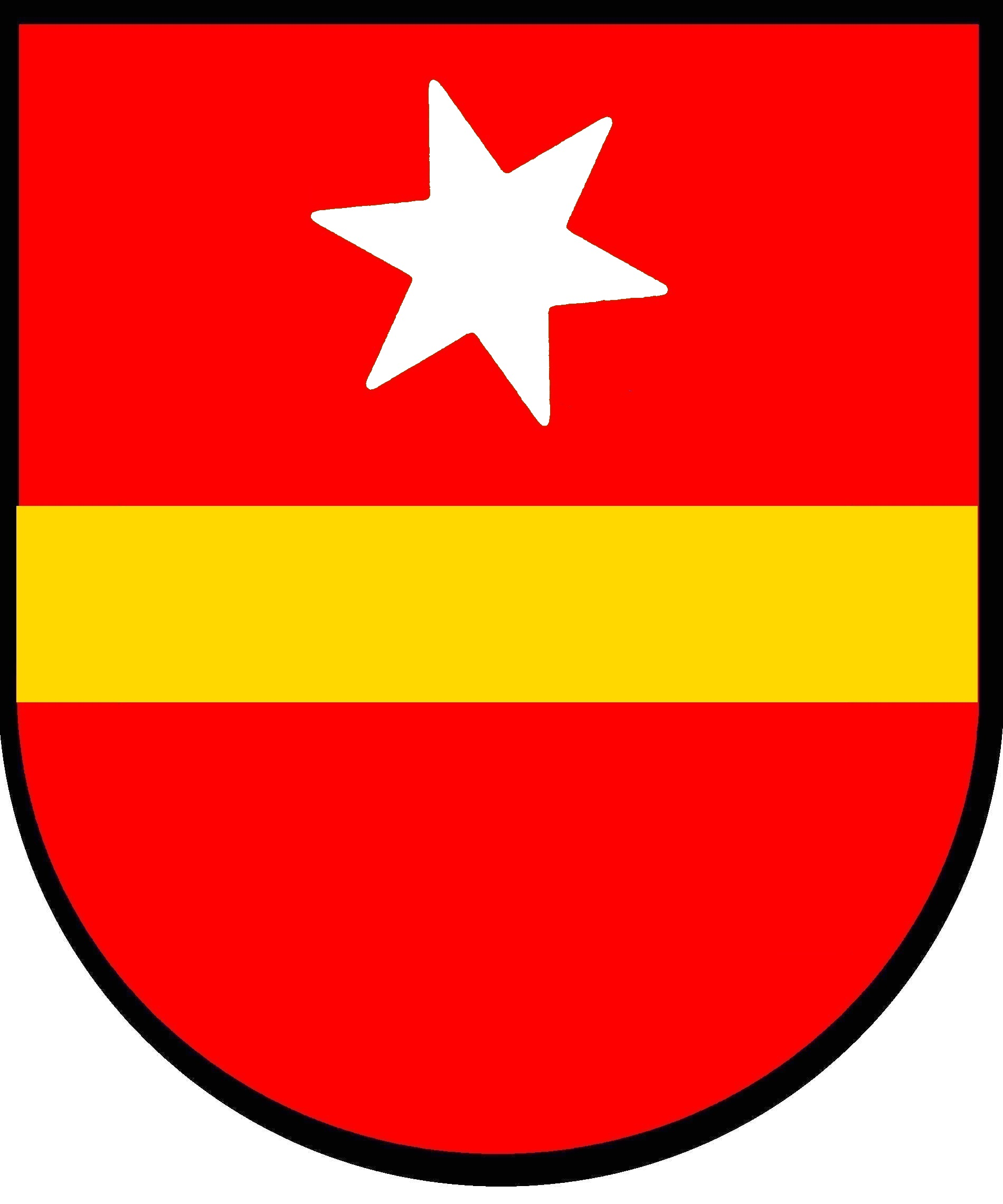 Wappen derer von Neuneck, gemäß Blasonierung und Vorlage erstellt